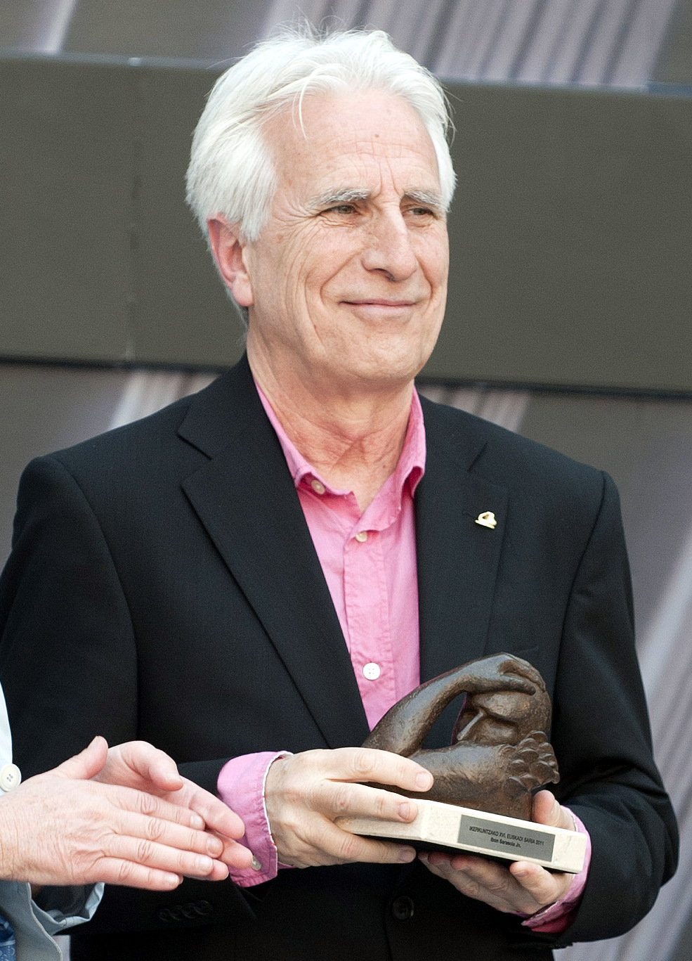 Ibon Sarasola con el premio Euskadi de Investigación.